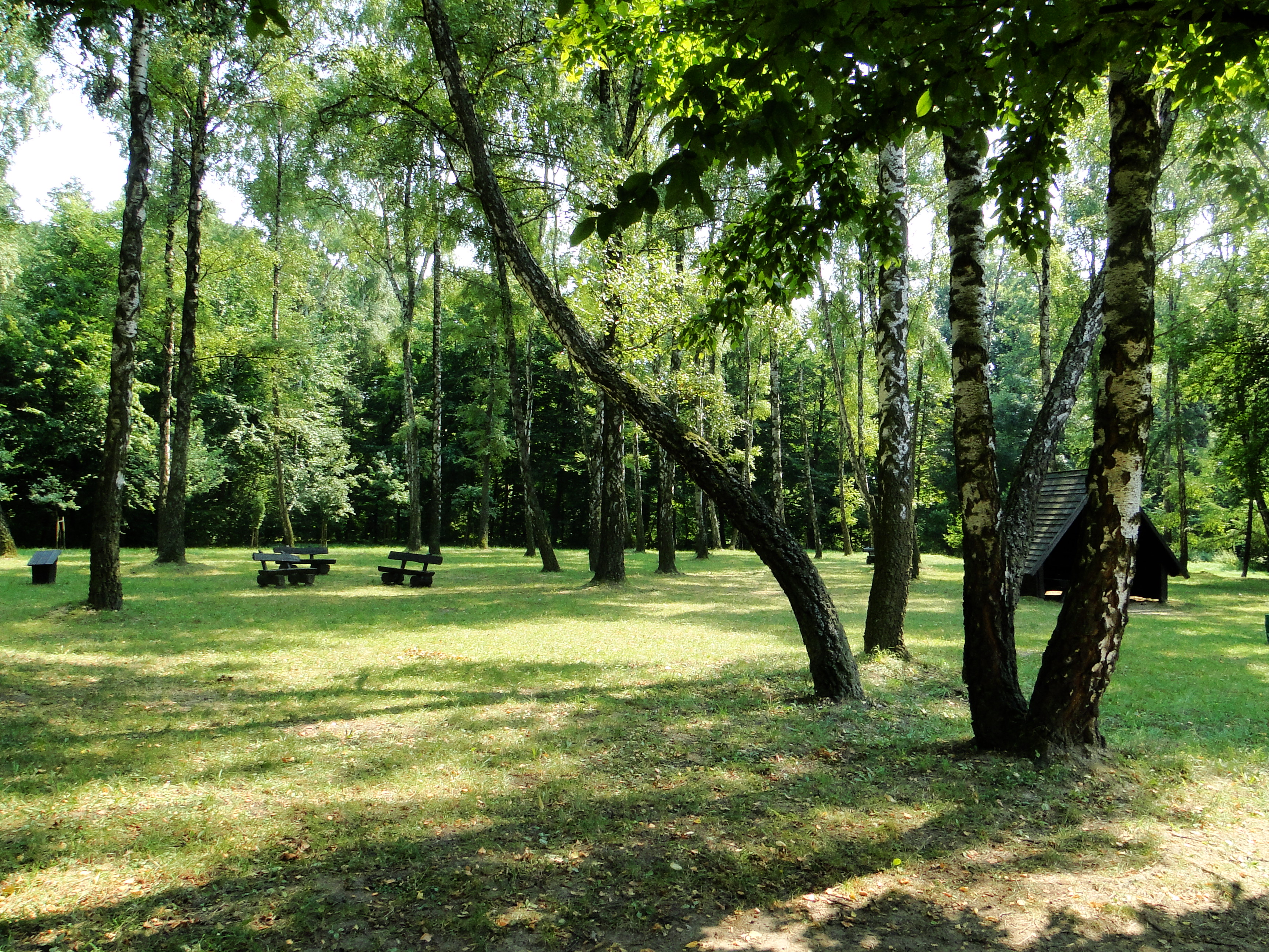 Las Wolski, Sowiniec.